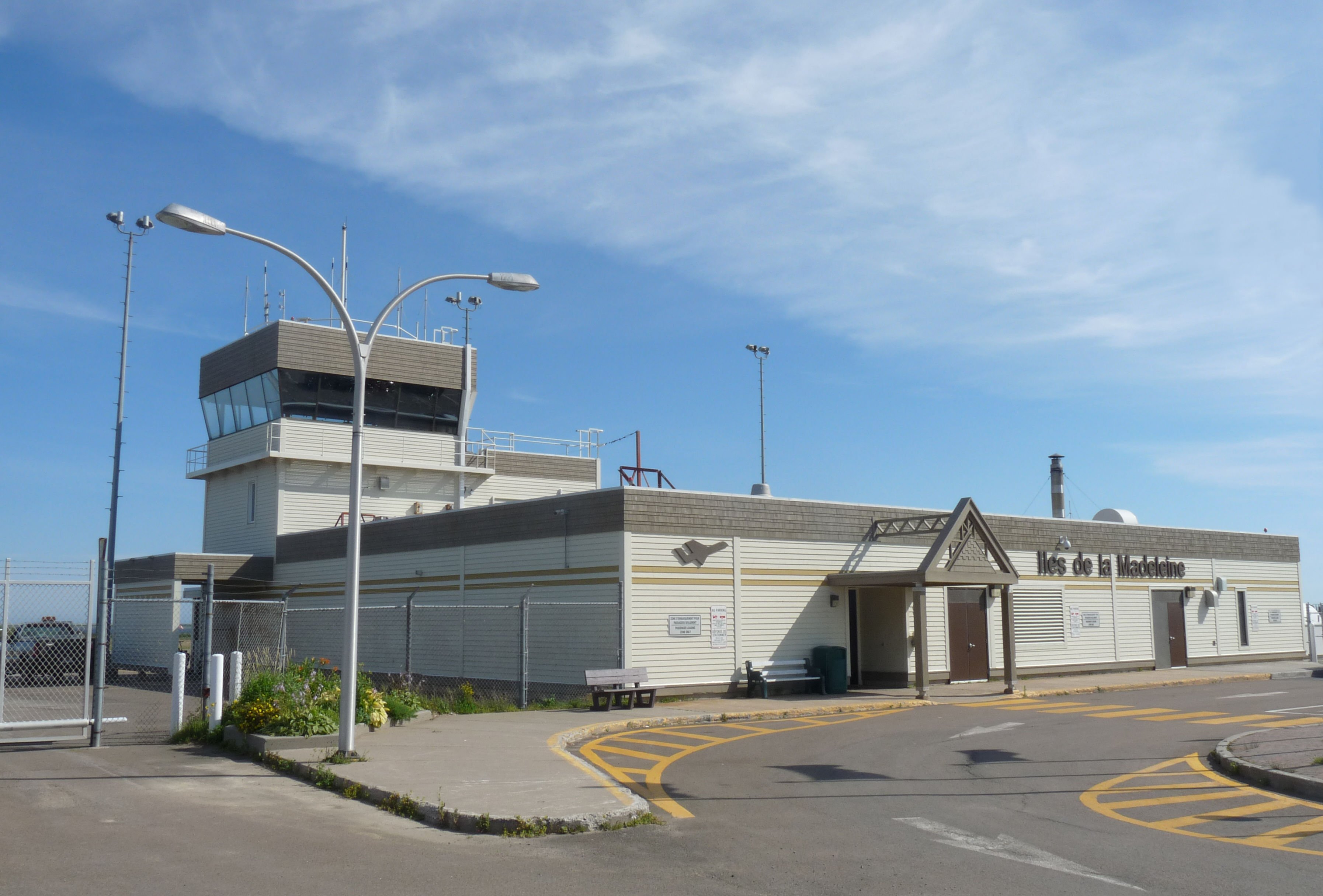 Aéroport des Îles de la Madeleine